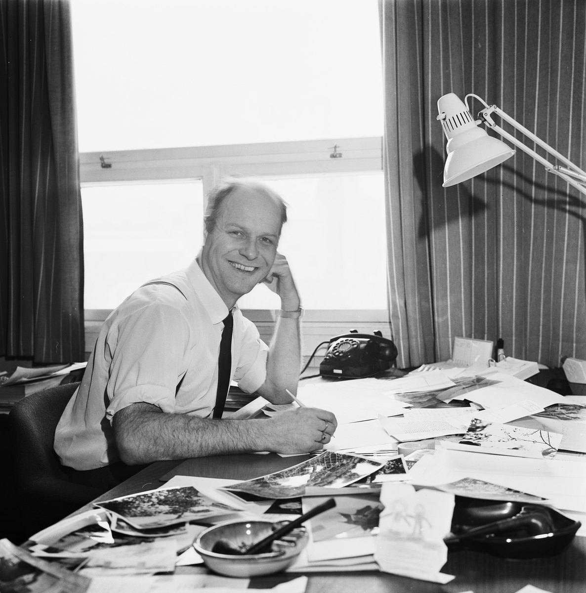 Dagfinn Tveito (født 1927 i Søgne) er en norsk hagemann og tidligere direktør i Det norske hageselskap.